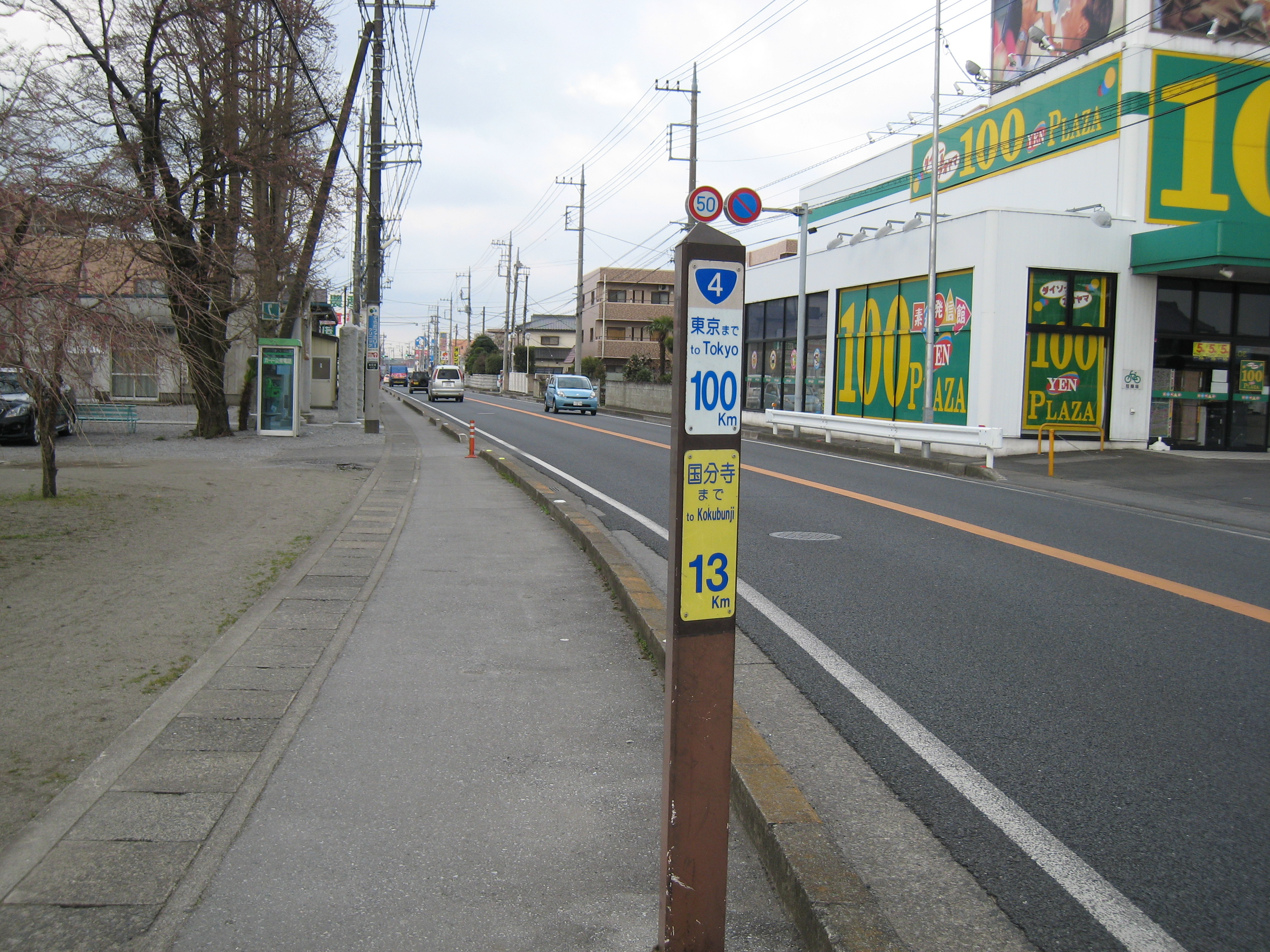 国道4号の100㎞キロポスト。場所は雀宮駅よりやや北、雀宮神社付近。カラーコーンのところは雀宮神社参道入口。